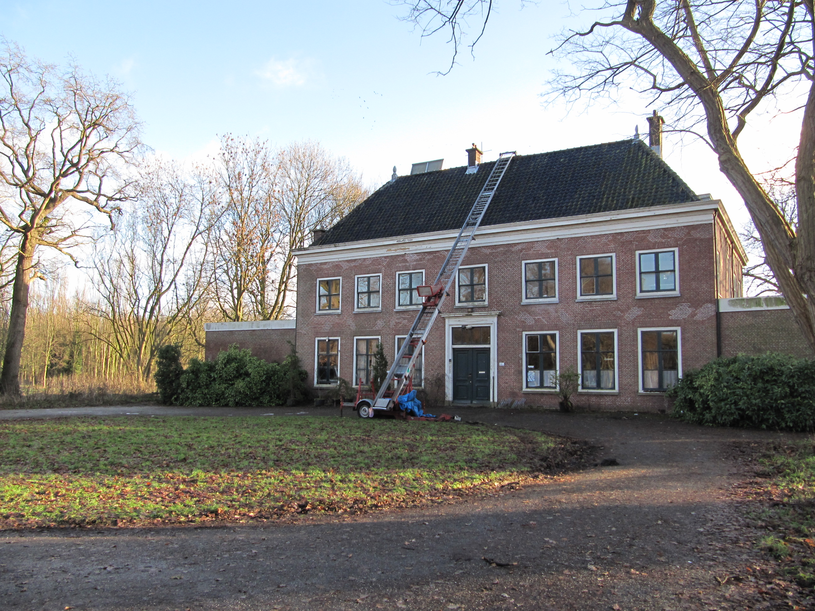 RM20082 Rijswijk - Van Vredenburchweg 985.jpg